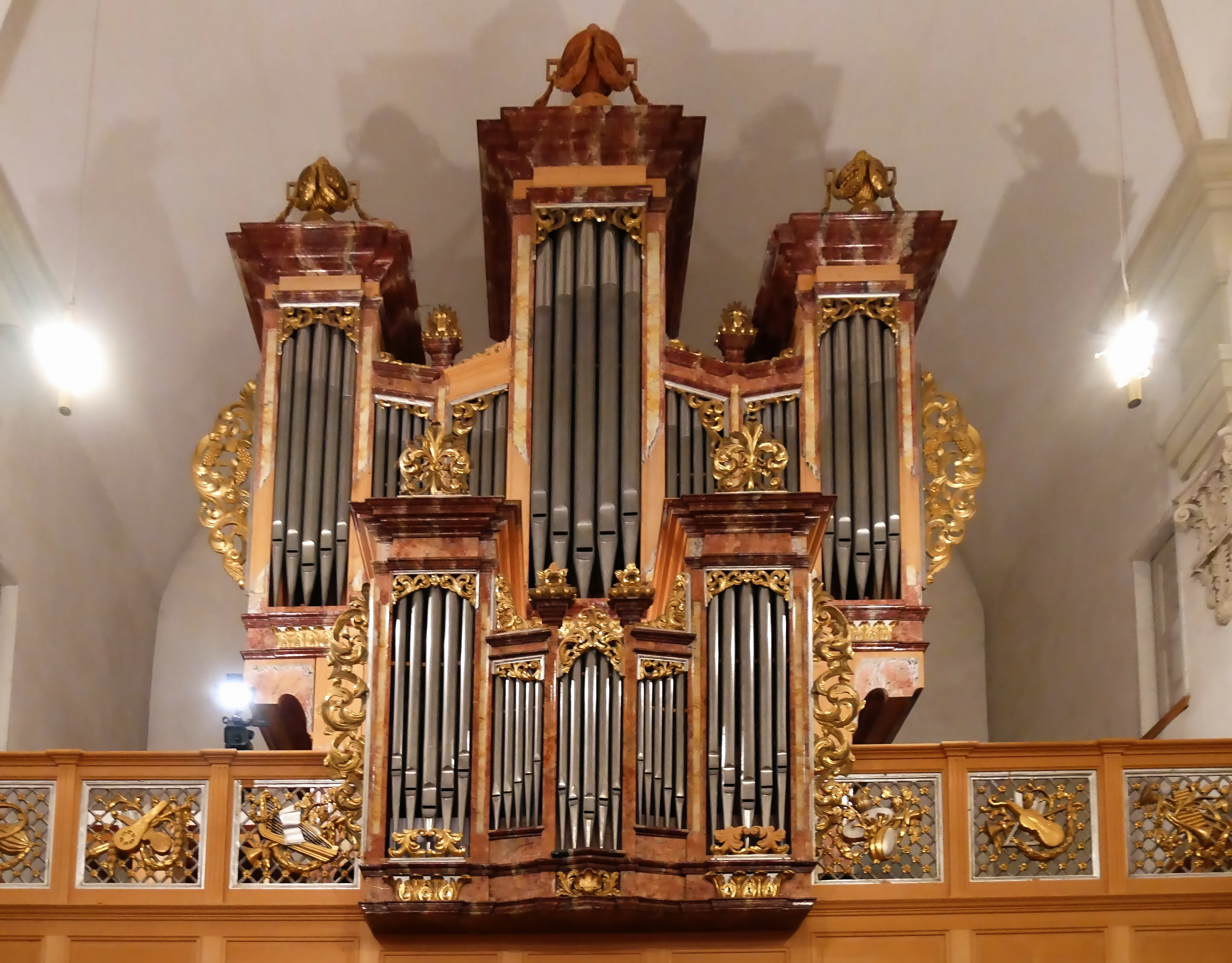 Orgel der Pfarrkirche Unsere Liebe Frau Mariä Geburt (Tschagguns) 1816 vom Elsässer Joseph Bergöntzle erbaut. 3 Manuale, Pedal, 38 Register